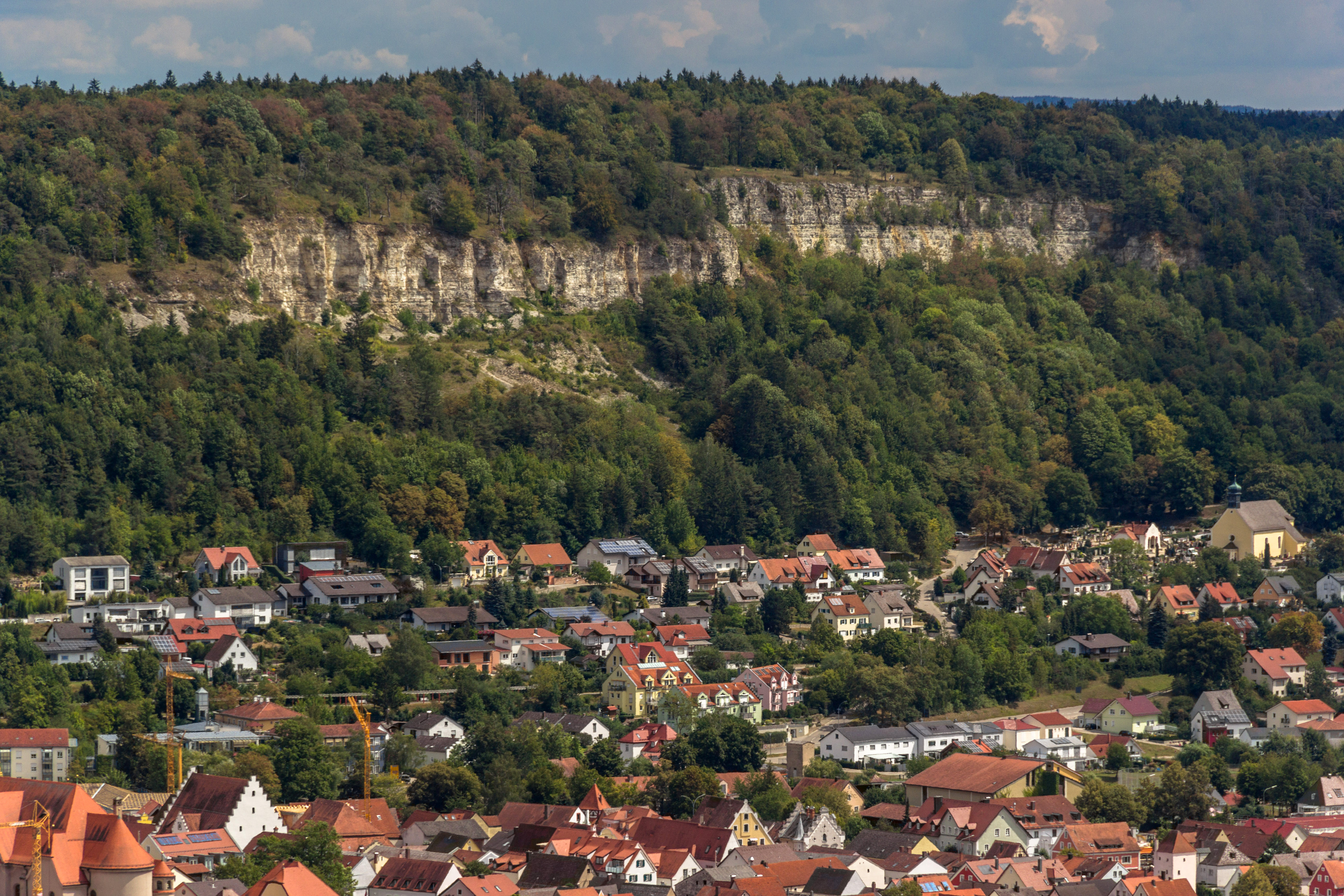 Aufgelassener Steinbruch am westlichen Arzberg, Geotop